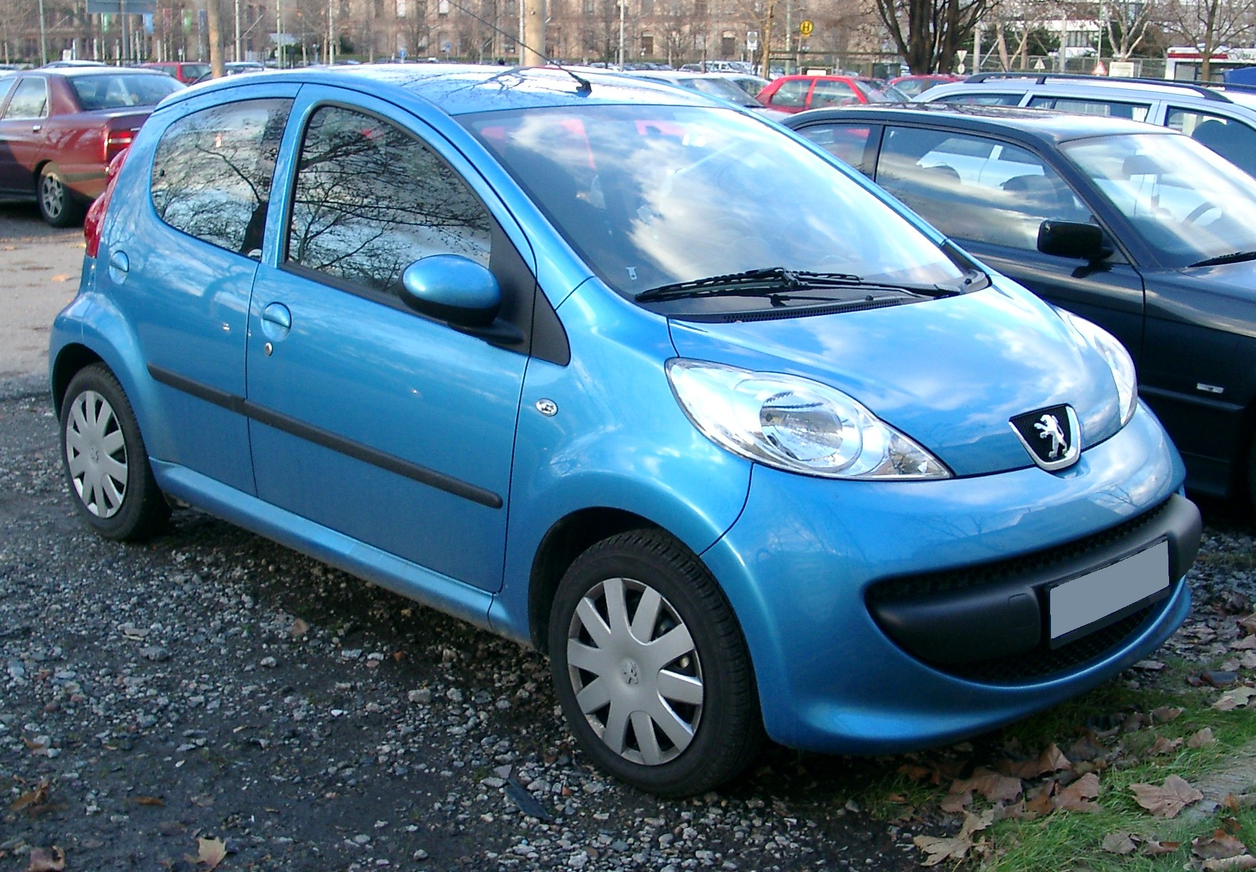 Peugeot 107